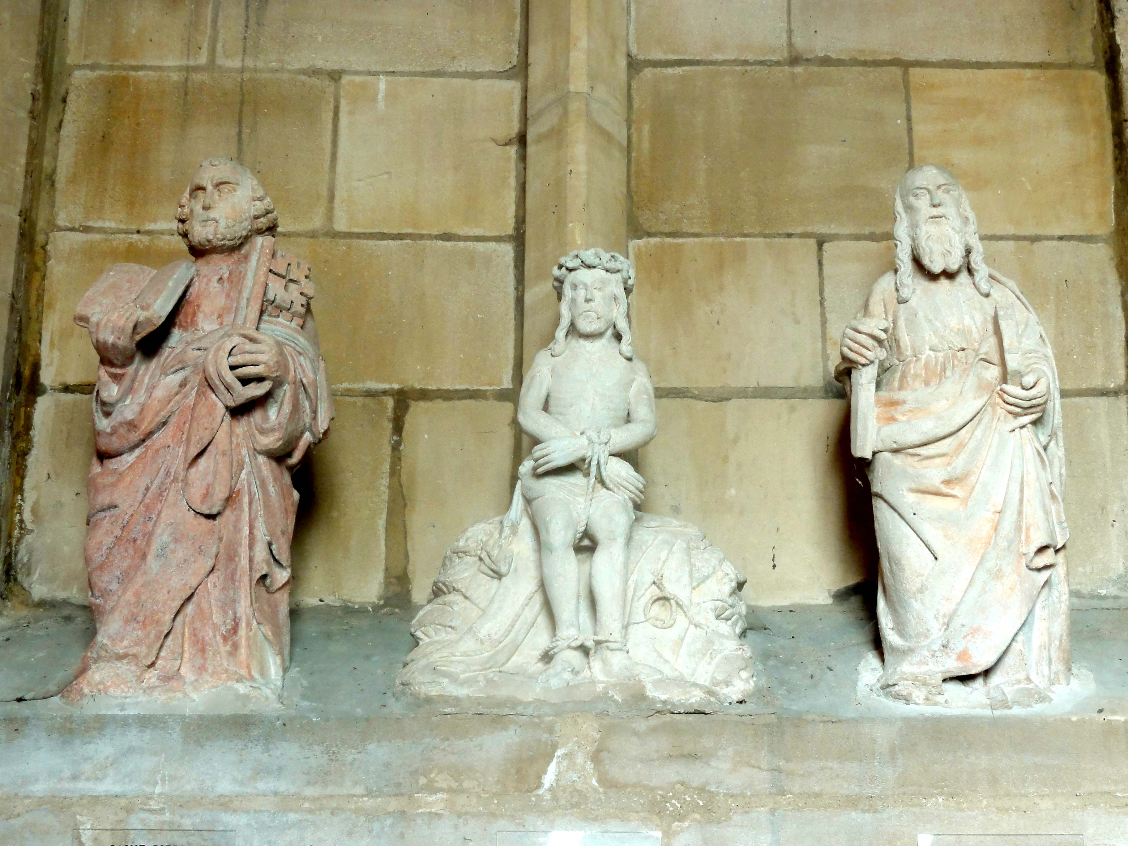 Statuettes de saint Pierre, Christ de pitié et saint Paul.